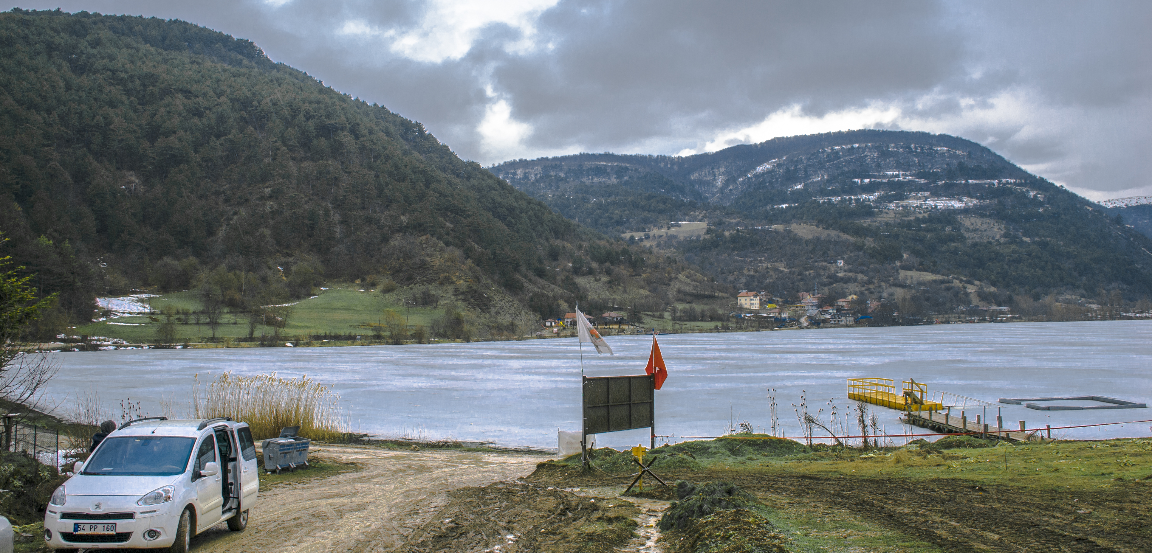 Çubuk Gölü'nde kış.Göynük, Bolu